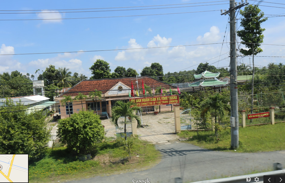 UBND xã Vĩnh Thạnh